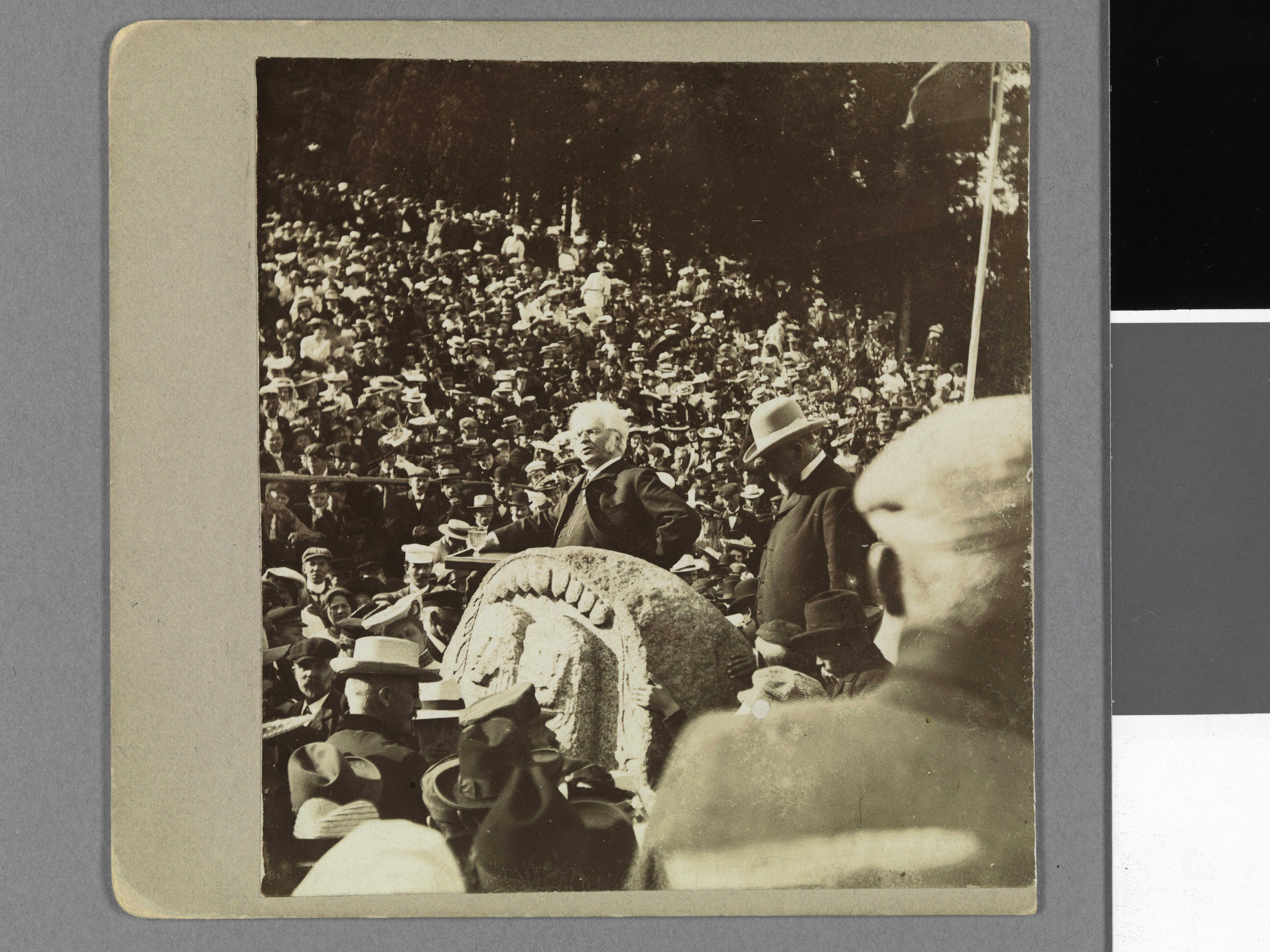 Bildet er hentet fra Nasjonalbibliotekets bildesamling. Anmerkninger til bildet var: Talen står i Jakob Petersen: Skamlingsbanken 1843-1943, Kbh. 1943 s. 186 Depicted person: Bjørnson, Bjørnstjerne